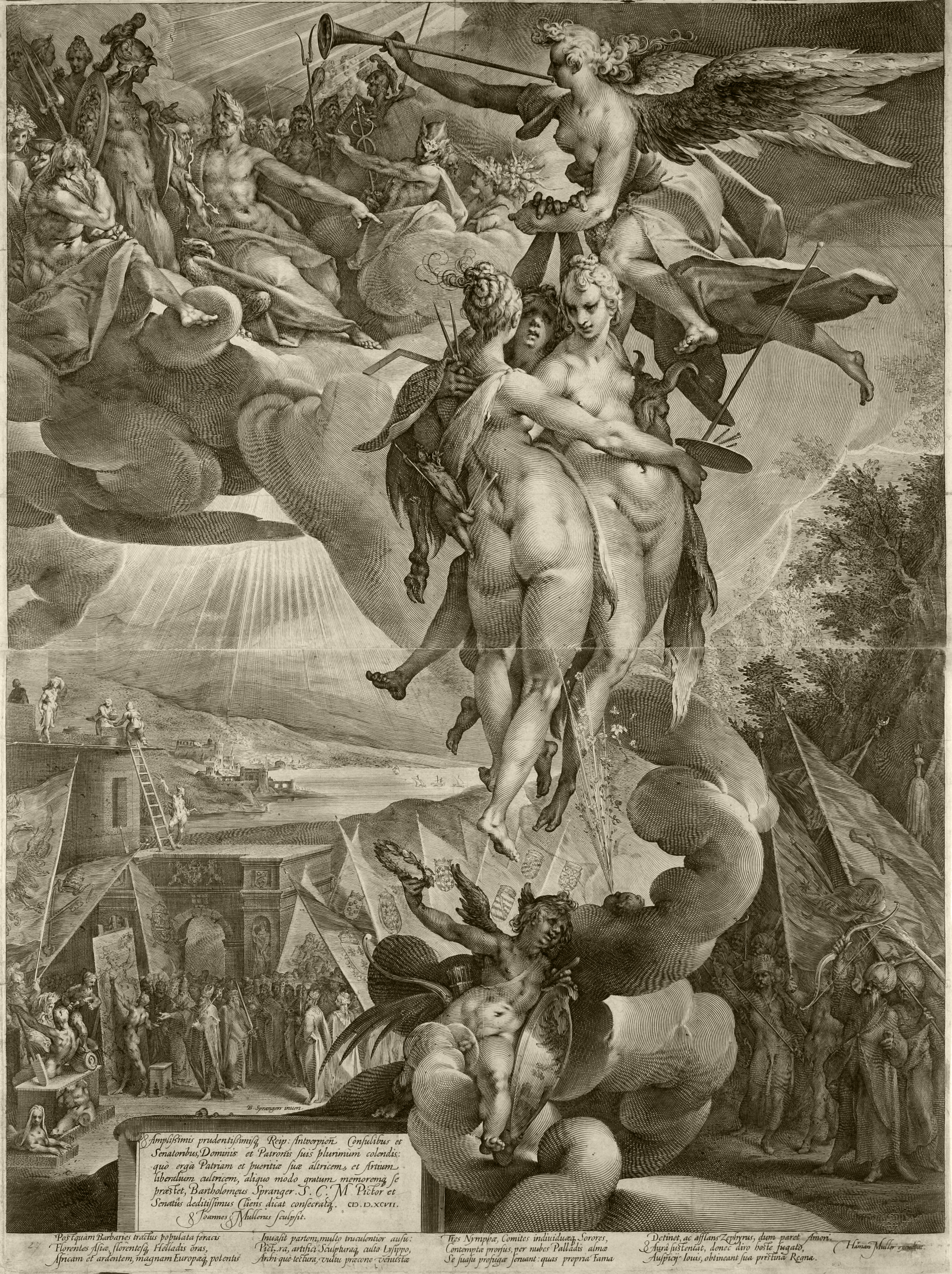 Jan Harmensz. Muller: Fáma uvádí Uměny na Olymp (Apoteóza umění (1597), mědiryt ze dvou desek, III. stav, 330x495 a 343x497 mm, Národní galerie v Praze